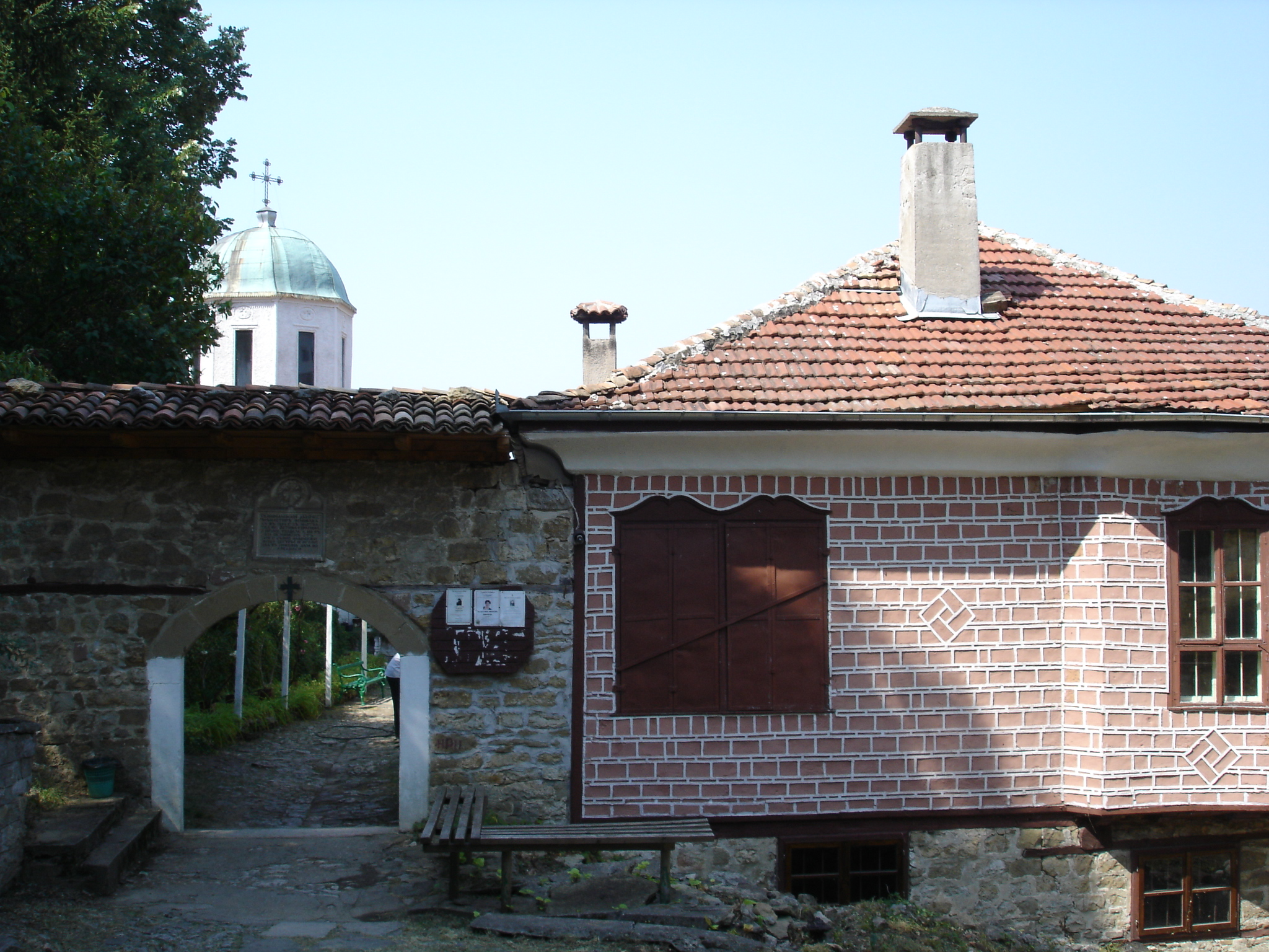 Saint Nikola Monastery, Arbanasi, Bulgaria